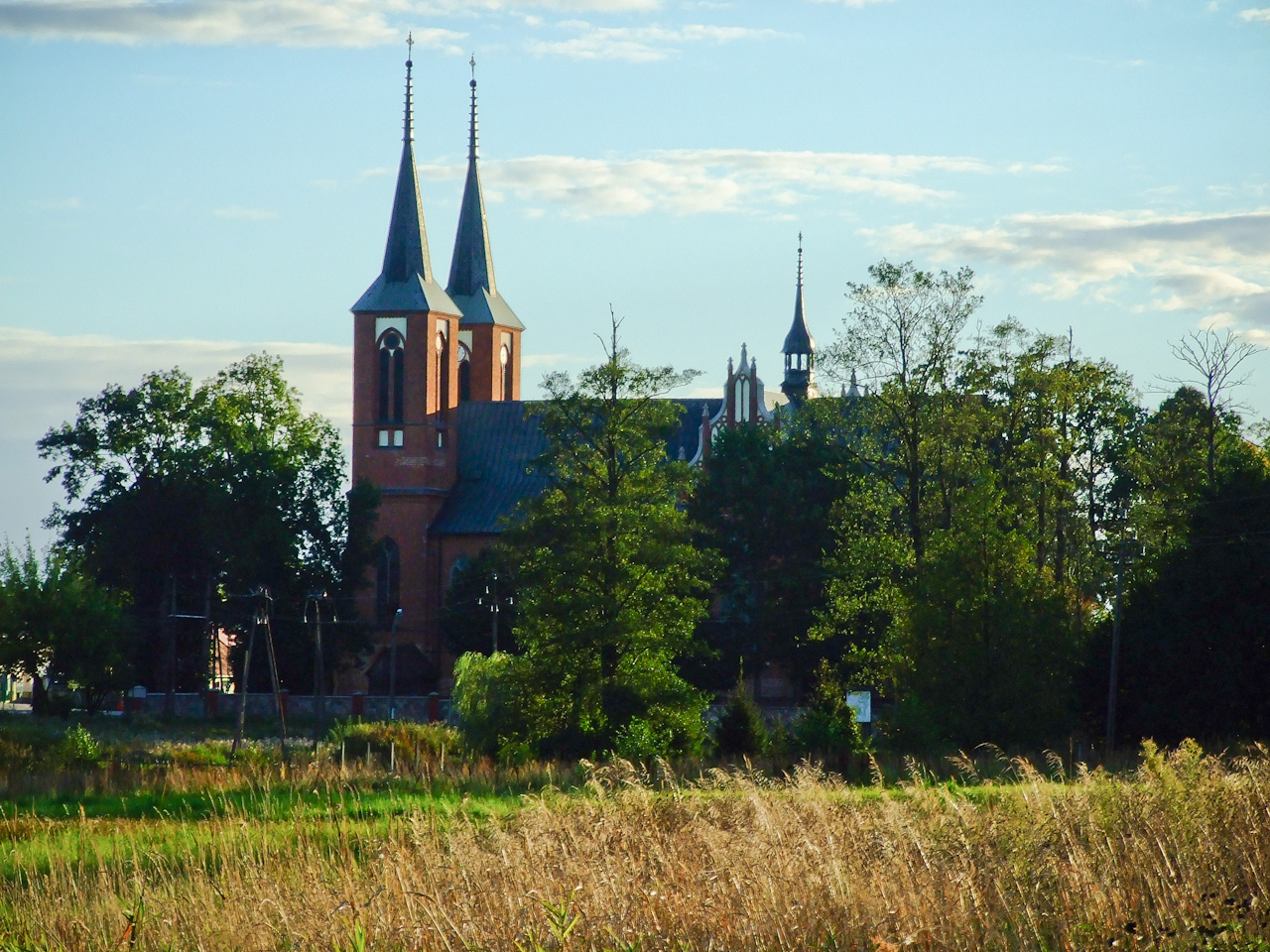 Długosiodło - rzymskokatolicki kościół parafialny p.w. św Rocha, 1908-1912 (widok na ścianę wschodnią).